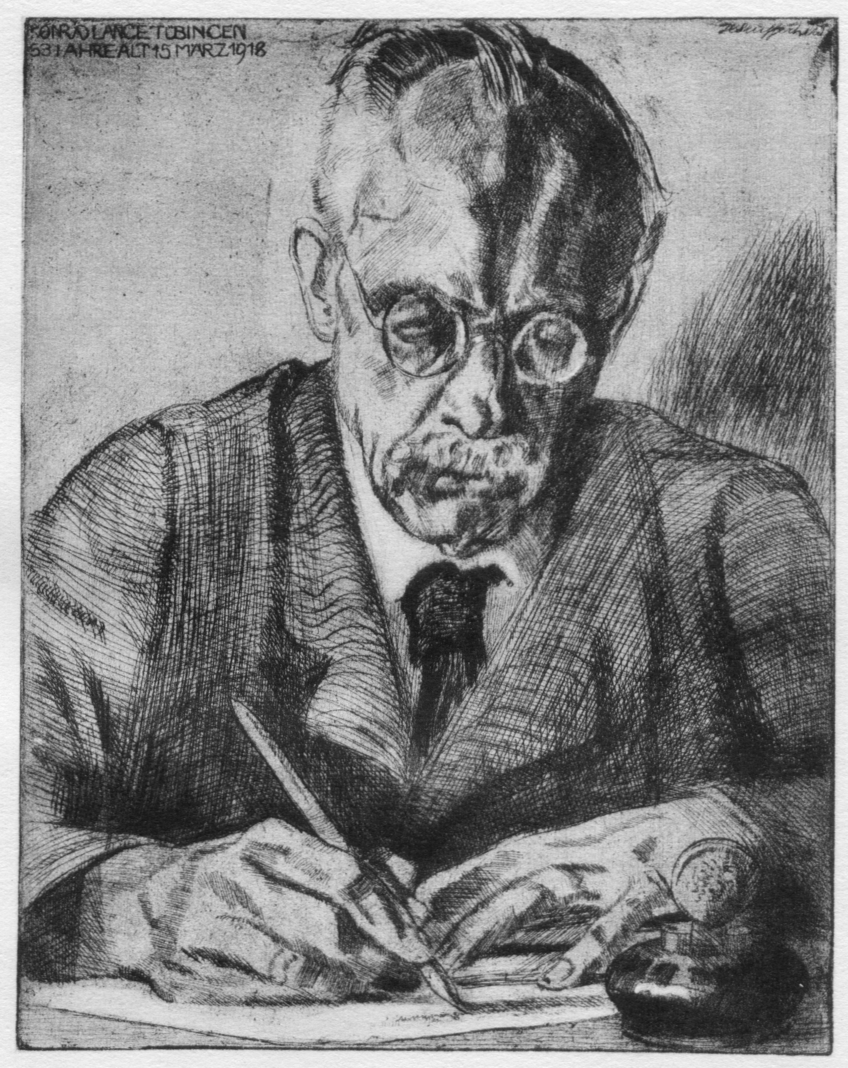 Konrad Lange. Der Ästhetiker, Kunsthistoriker und Universitätsprofessor Konrad Lange. Bild beschriftet mit KONRAD LANGE TÜBINGEN 63 JAHRE ALT 15 MÄRZ 1918. Op. 132,3 im Katalog der Radierungen. Strichätzung, Plattengröße 286×227 mm